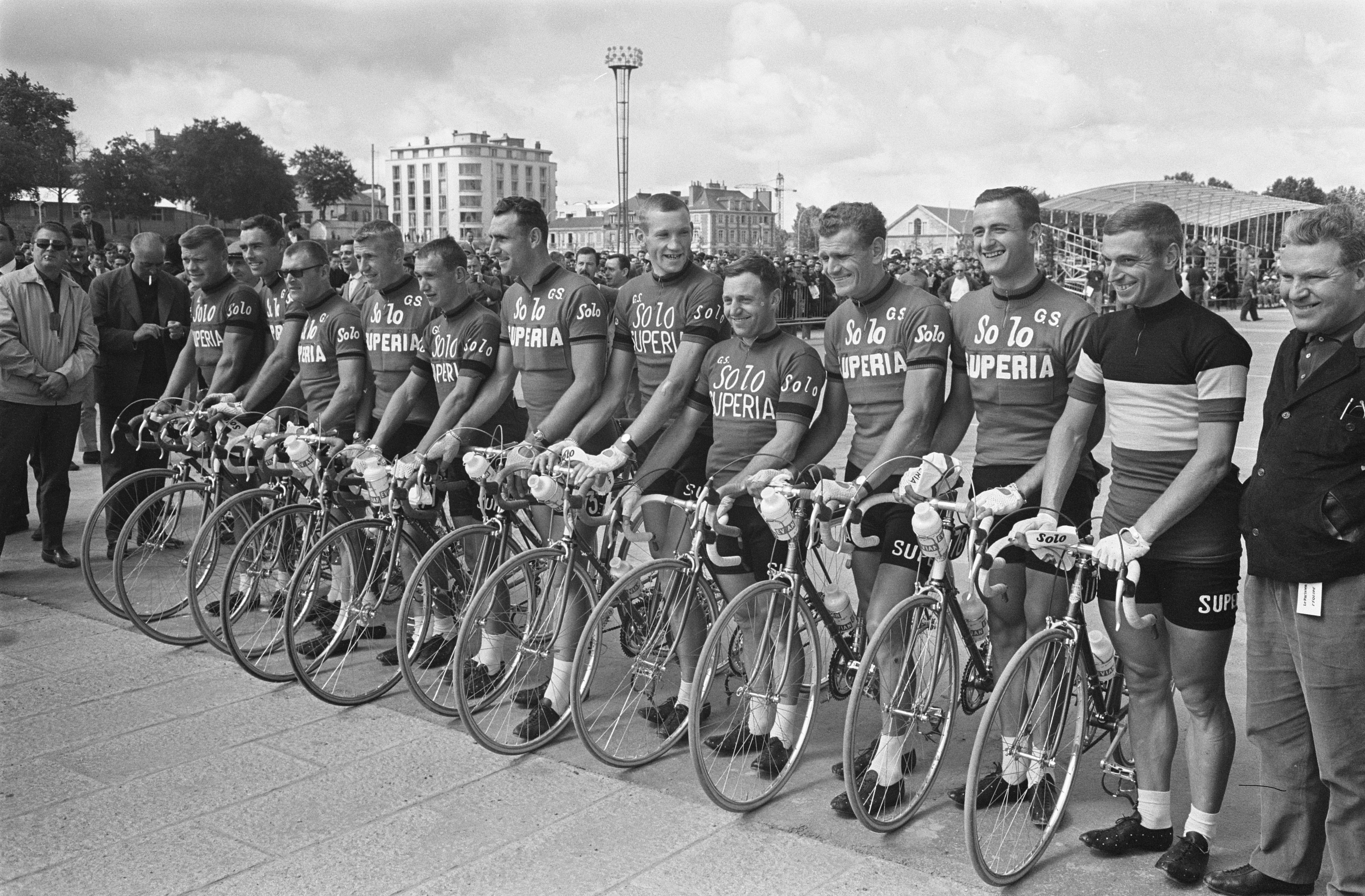 51ste Tour de France 1964, De Solo-Superia ploeg. Van Looy (in trui Belgisch kampioen) staat vooraan. De 5e renner van rechts is Ward Sels.